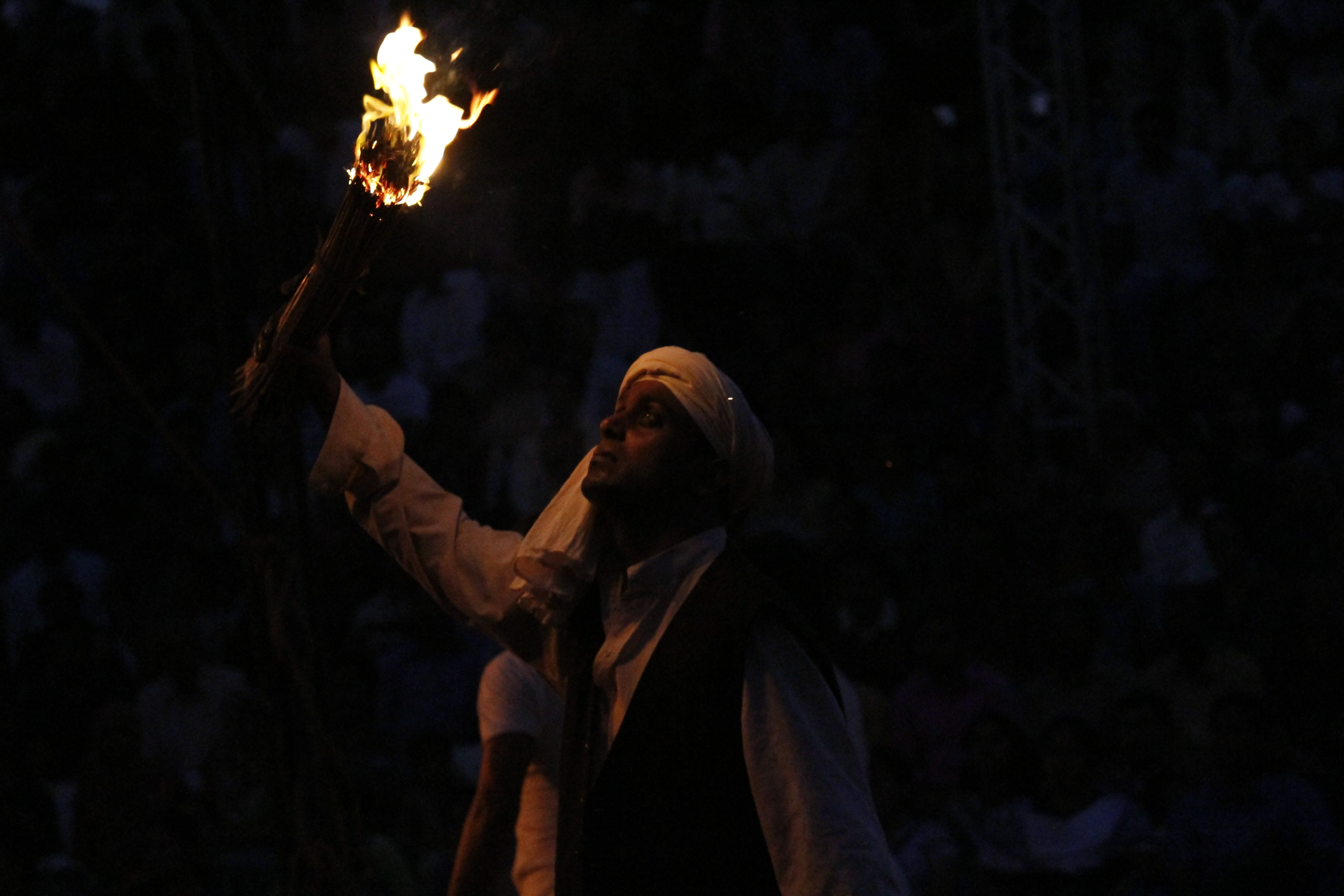 ഖസാക്കിന്റെ ഇതിഹാസം നാടകത്തില്‍ നിന്ന്.